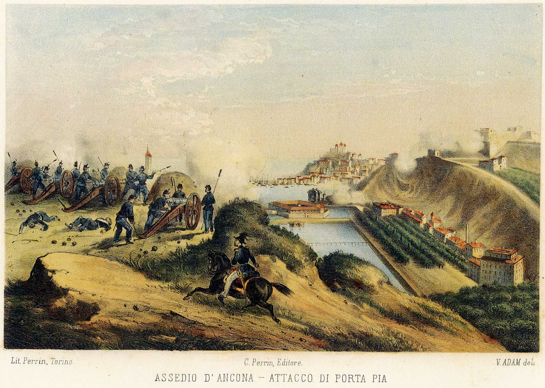 Assedio d'Ancona, attacco di porta Pia. Litografia a colori, 225 x 165 mm